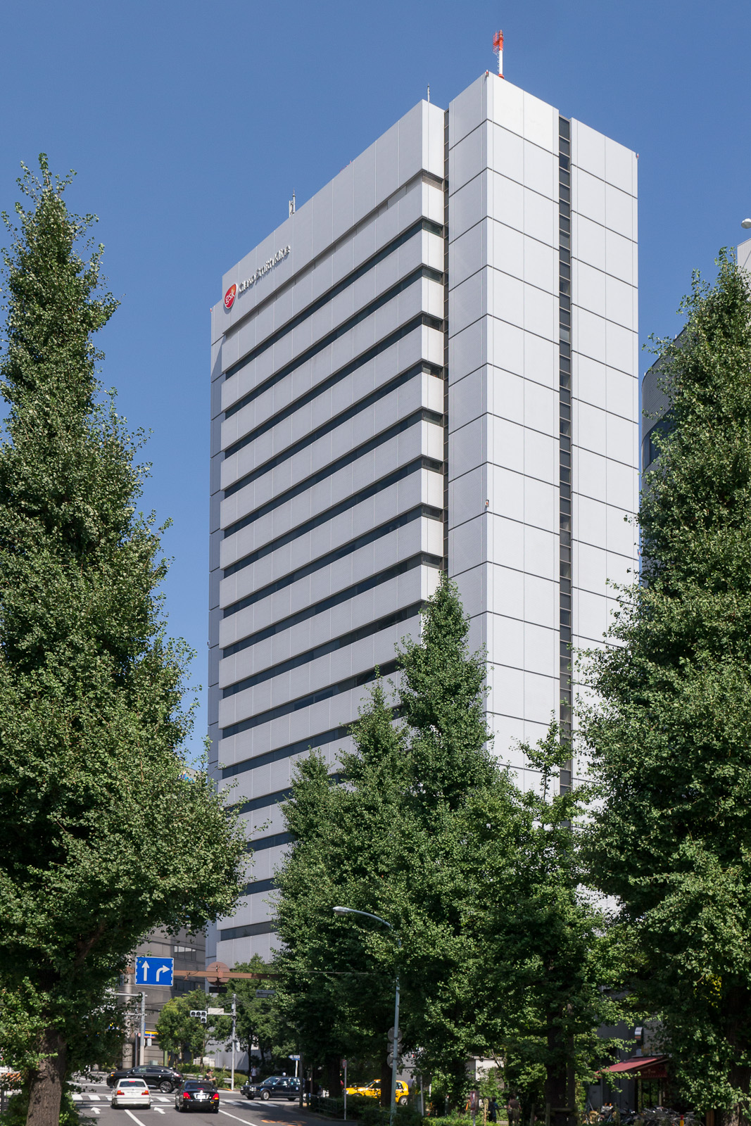 GSKビル（グラクソ・スミスクライン日本法人本社）、東京都渋谷区千駄ヶ谷4丁目。